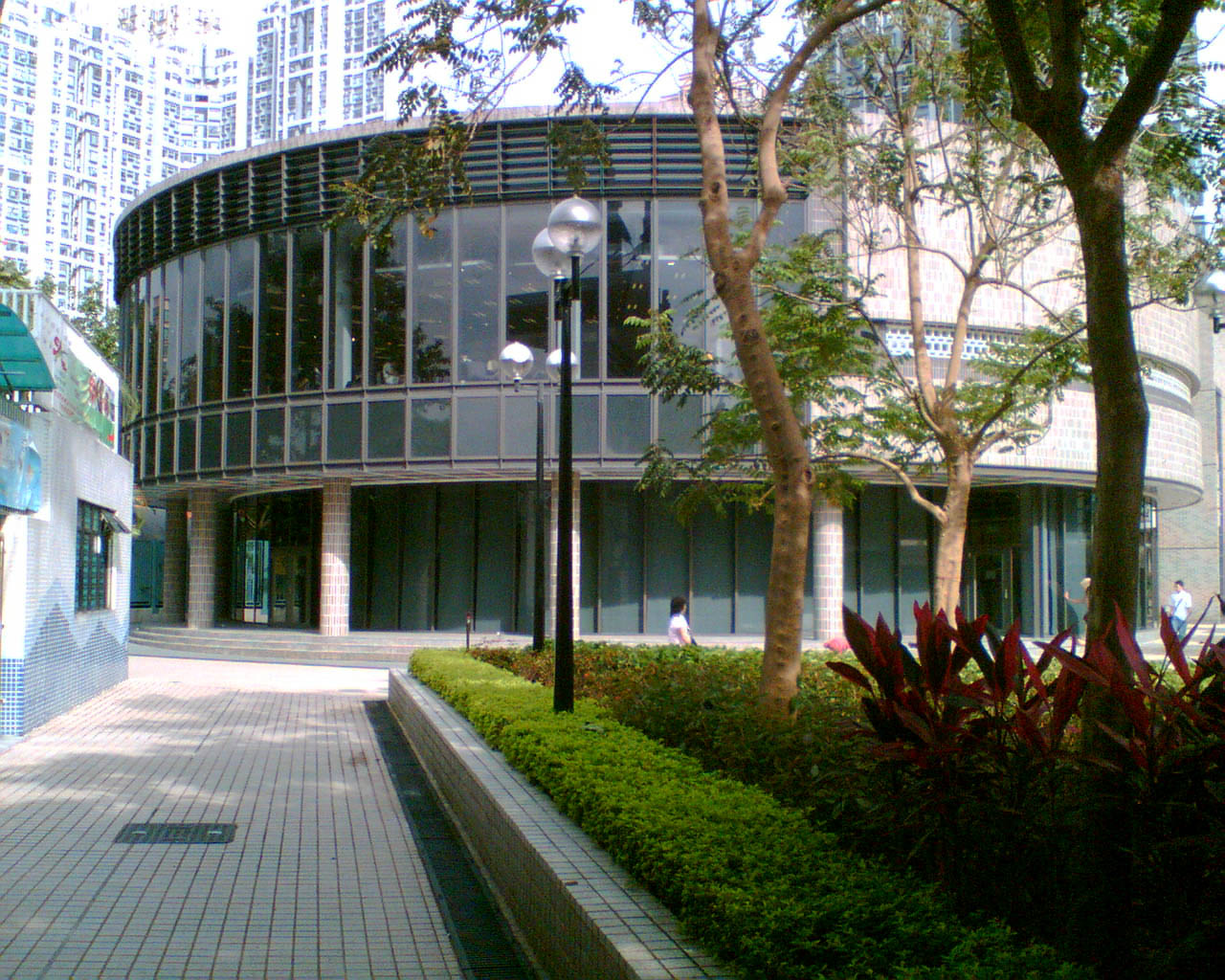 中文（香港）: 馬鞍山公共圖書館大樓。